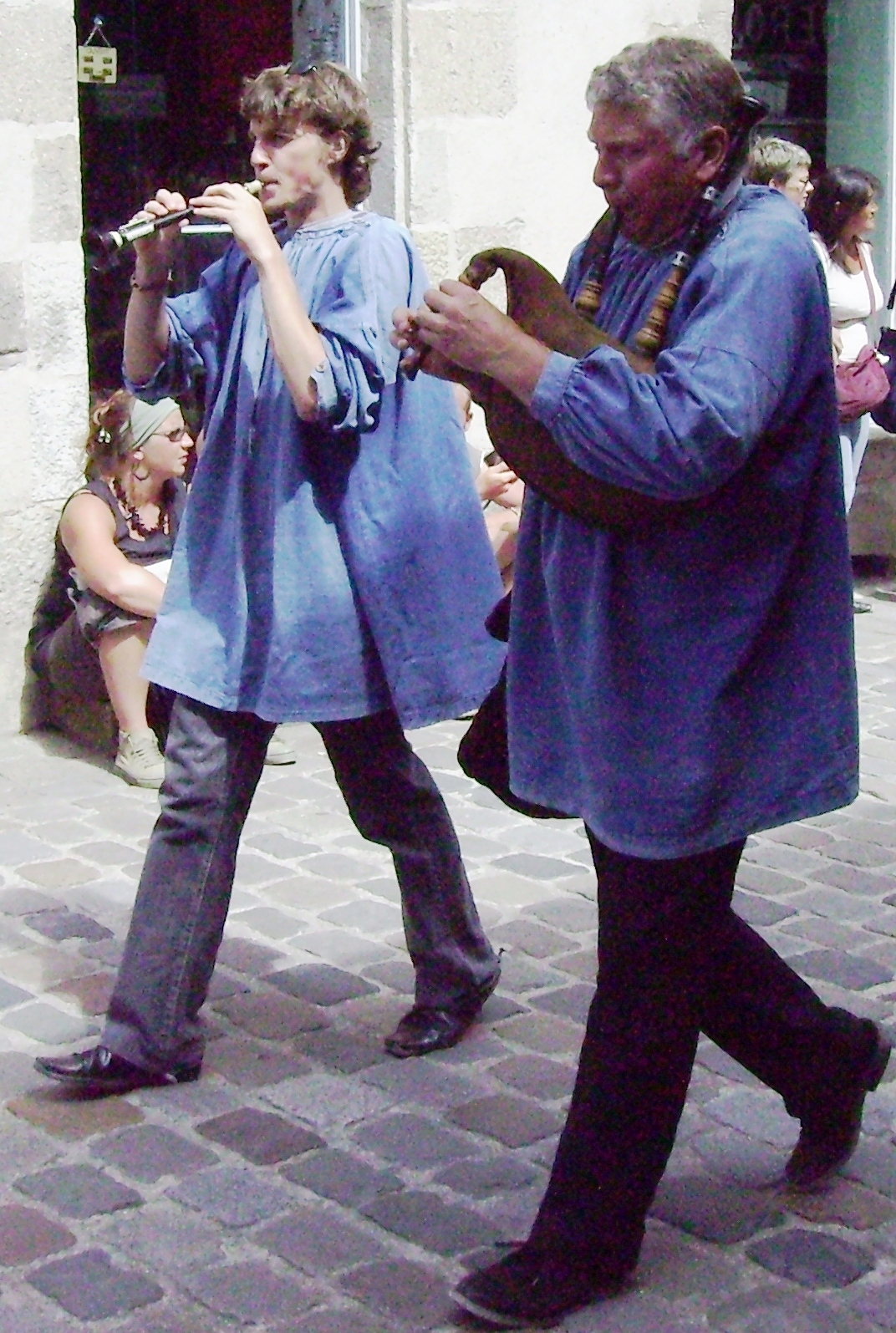 bretonische Musiker mit Bombarde und Biniou